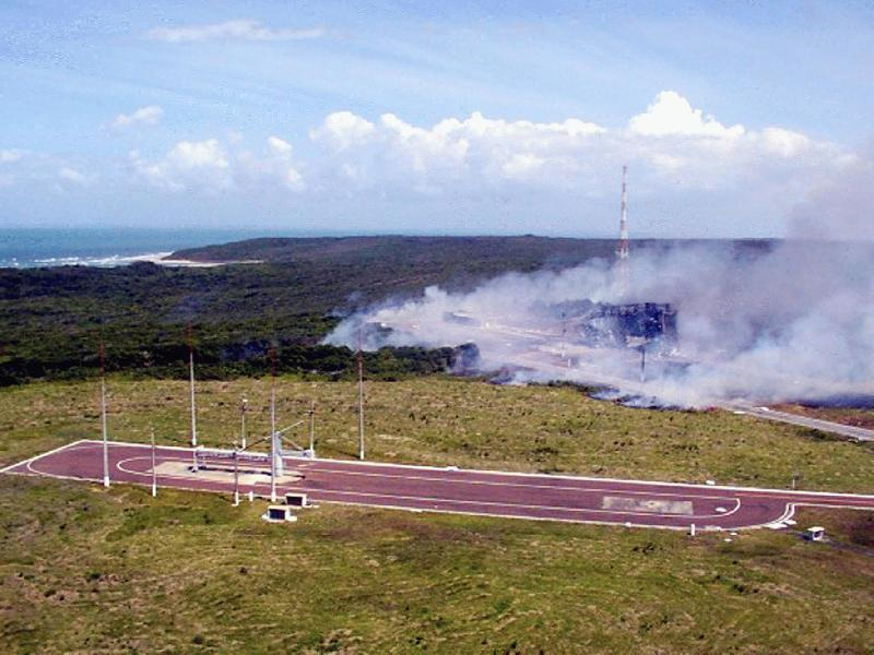 Acidente de Alcantara, 24 de Agosto de 2003.